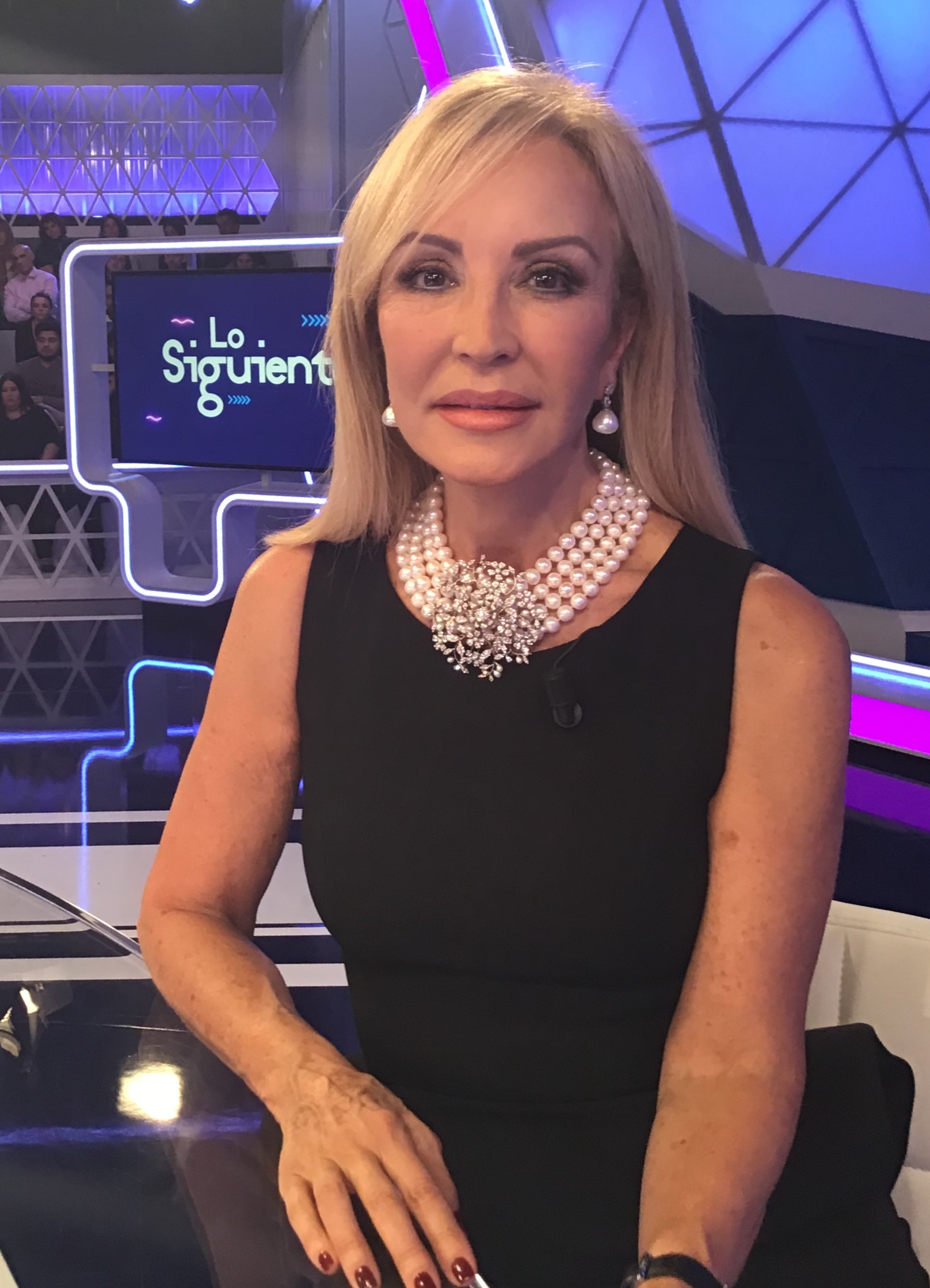 Fotografía de Carmen Lomana en el programa Lo Siguiente de TVE tomada por Raquel Sánchez Silva en octubre de 2018.